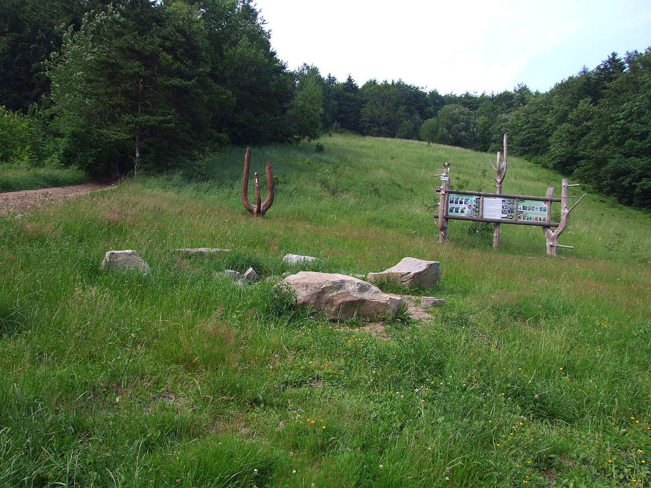 Sucha Przełęcz w Beskidzie Makowskim